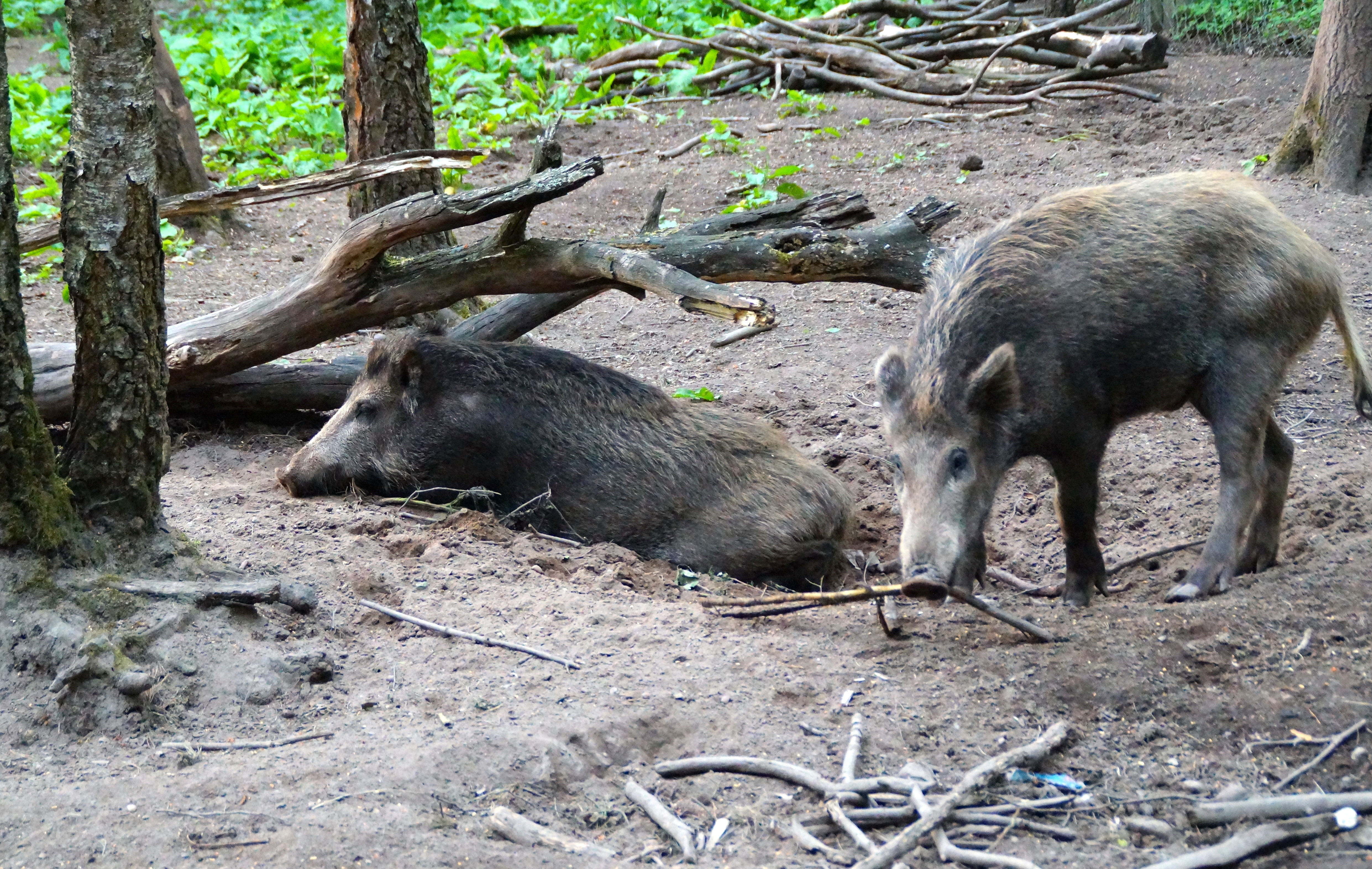 Das Bild wurde in Fürther Stadtwald aufgenommen.